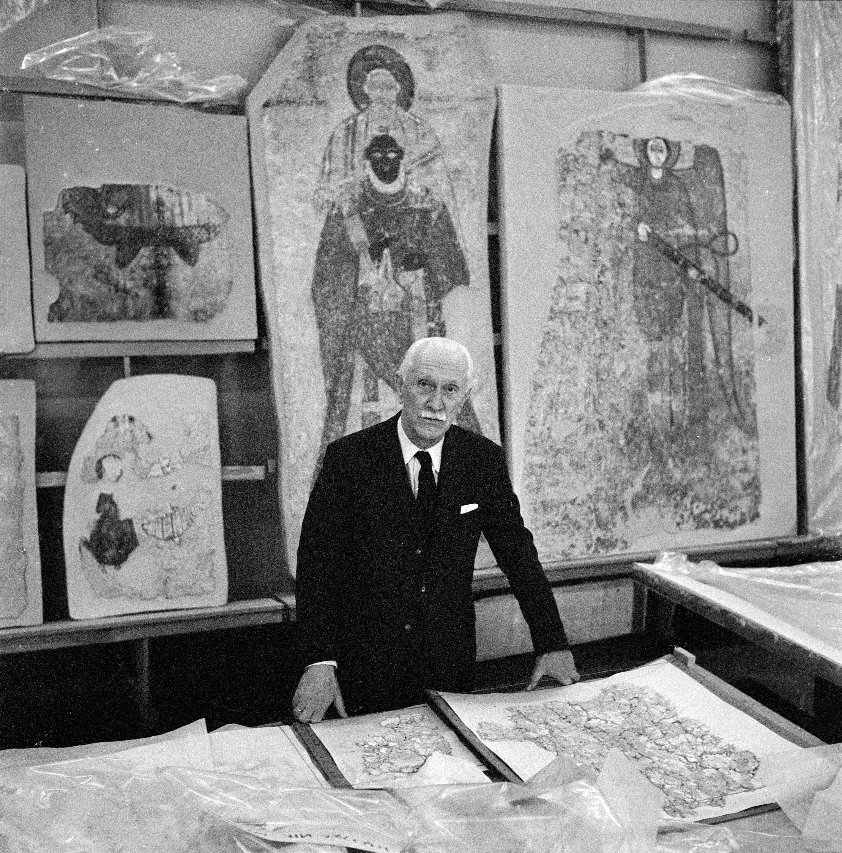 Kazimierz Michałowski na tle malowideł z Faras, Muzeum Narodowe w Warszawie